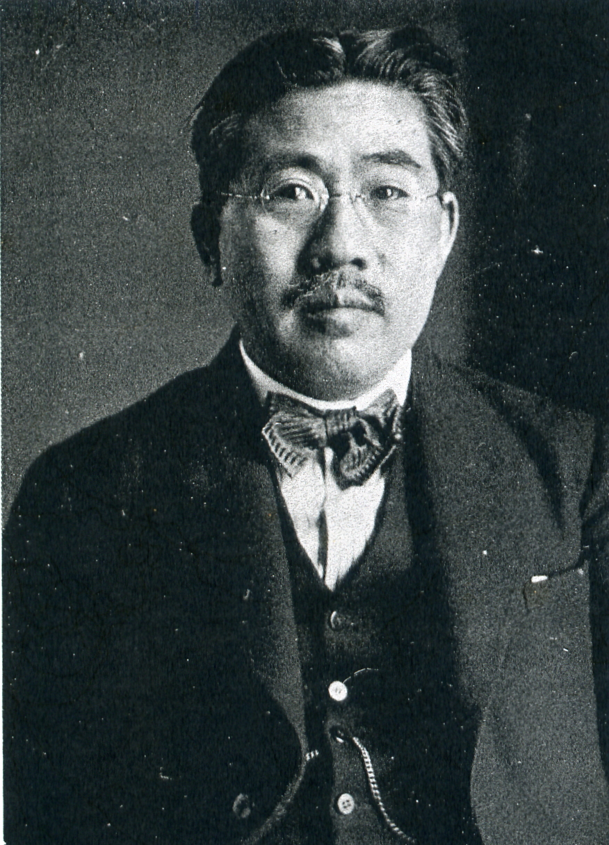 この写真は、植原悦二郎（1877-1962）の写真です。